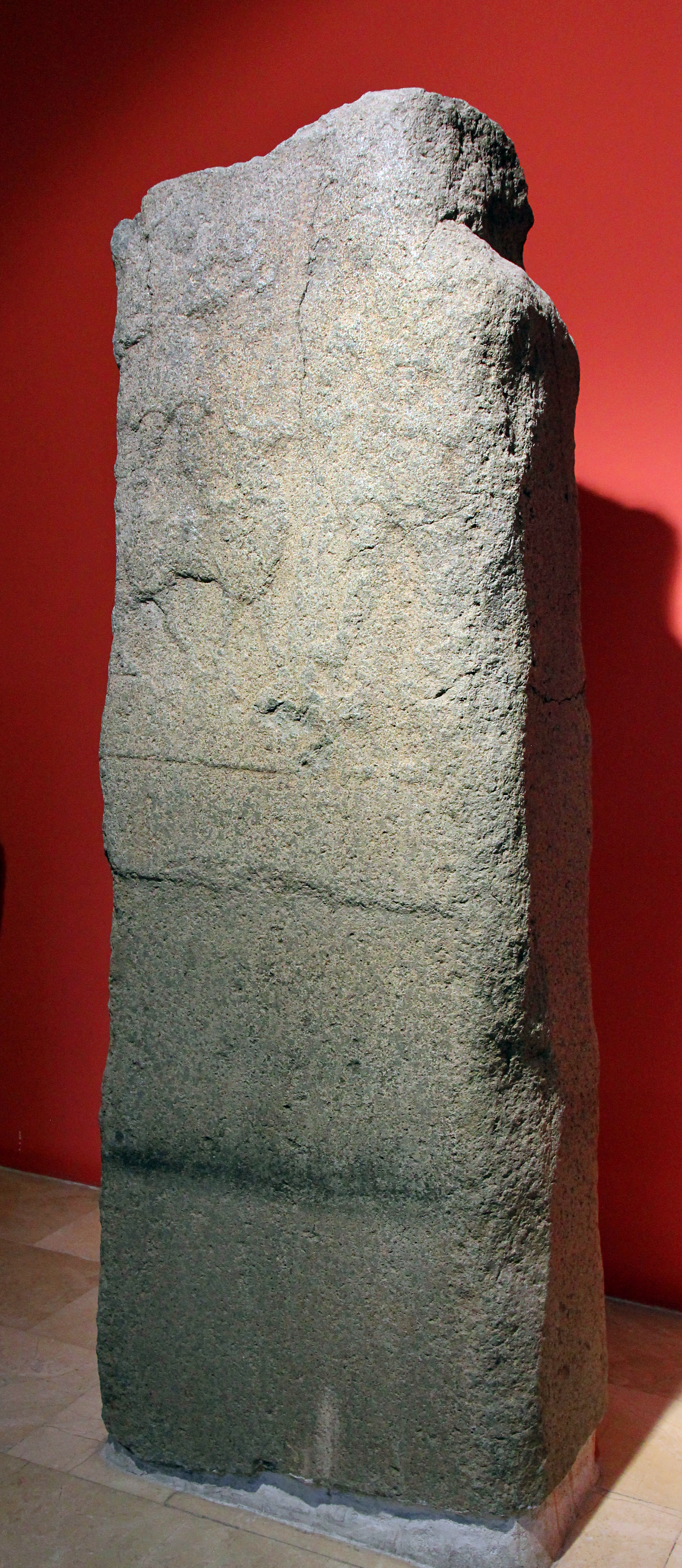 Archäologisches Museum Sivas, Zentraltürkei, hethitische Stele von Altınyayla